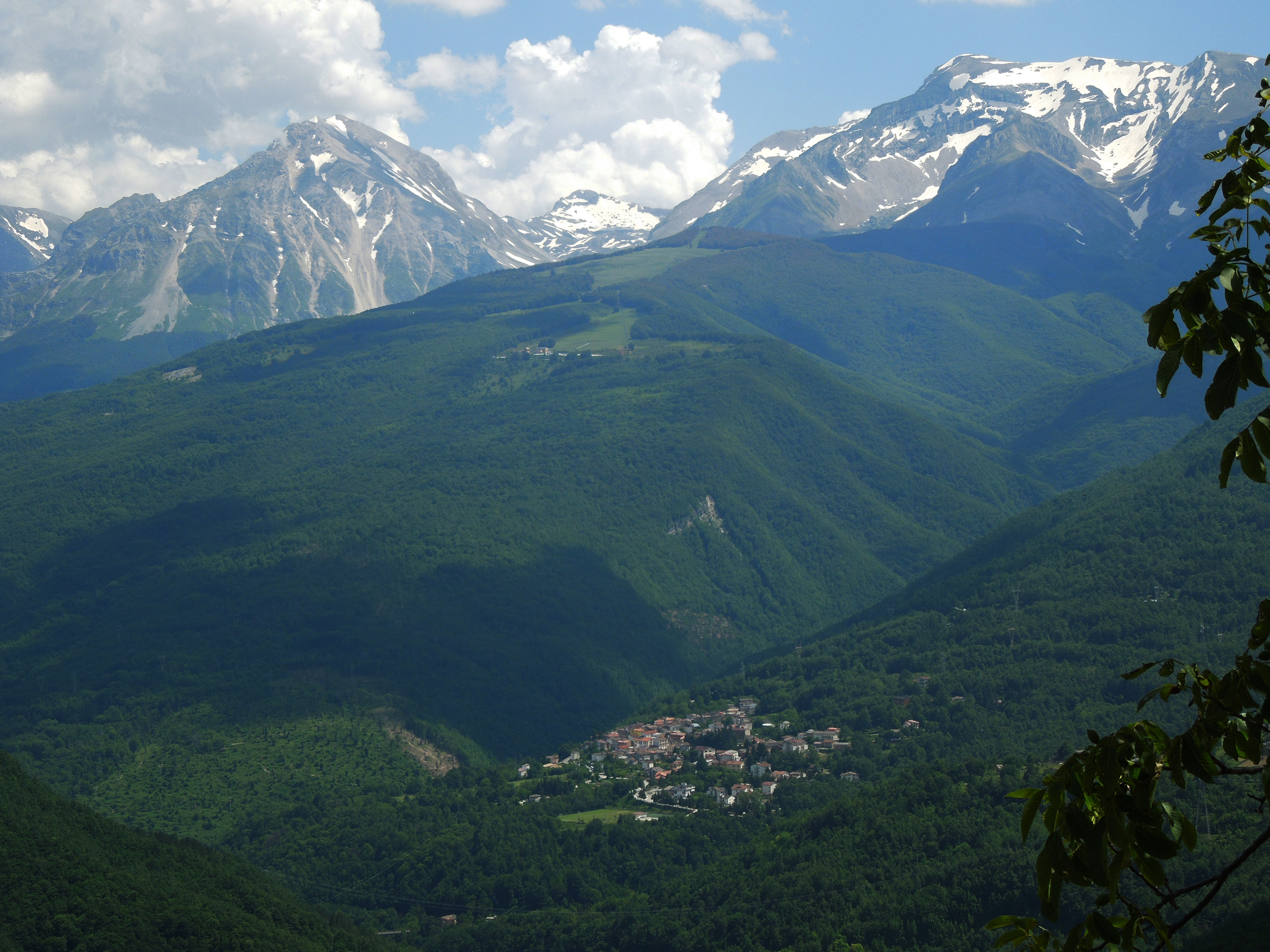 Panorama del paese di Nerito, frazione del comune di Crognaleto in provincia di Teramo.